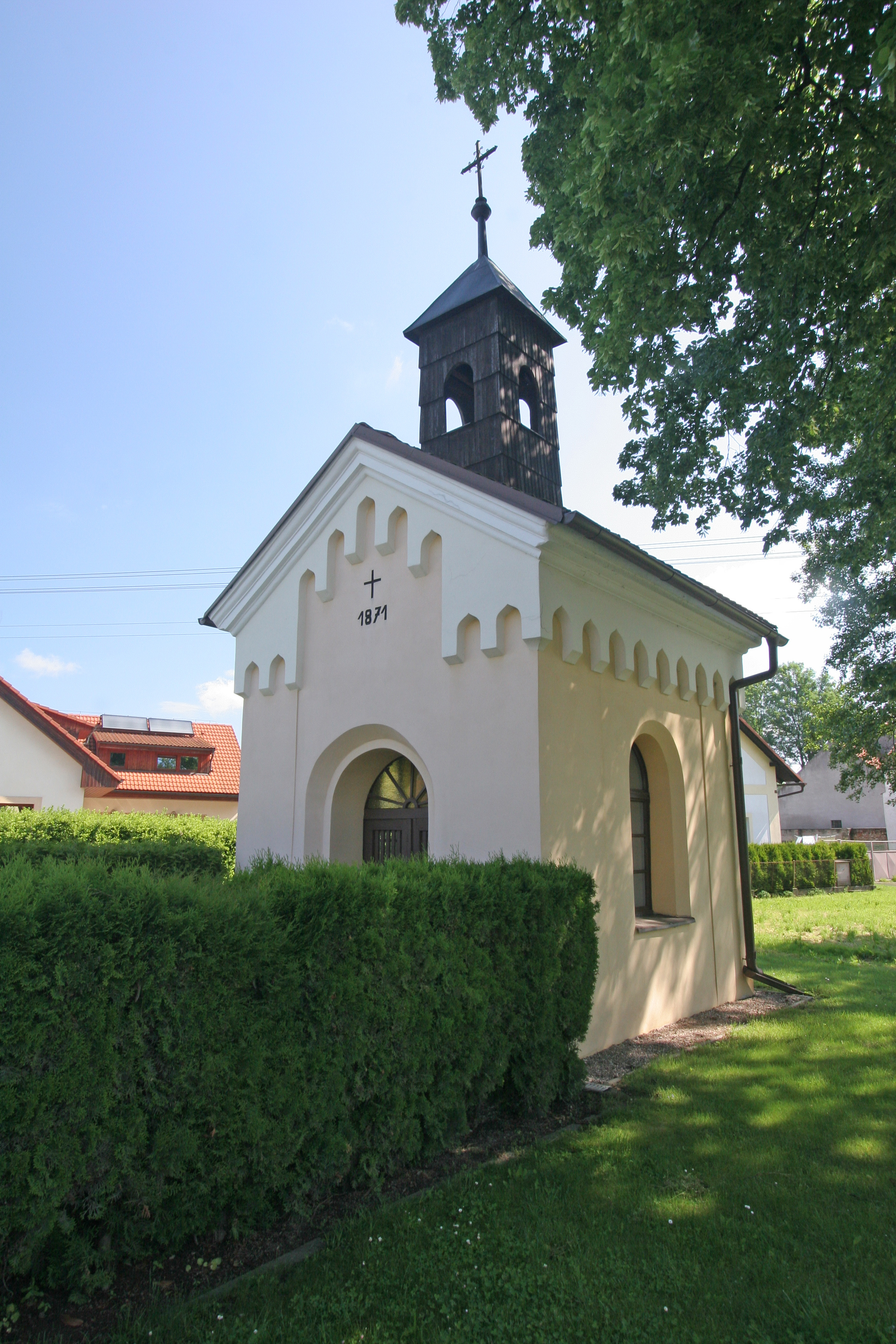 Čepí - kaple Panny Marie Karmelské